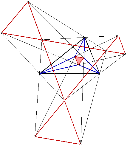 Enkele alternatieven voor de driehoek van Morley door buitentrisectrices te gebruiken. (eigen illustratie)